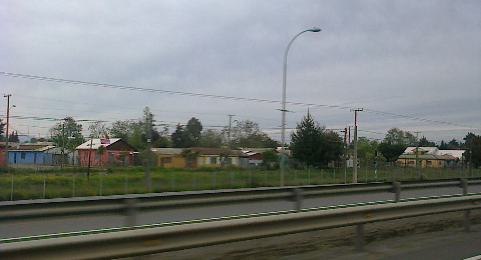 Vista de la ciudad de Longaví desde la Ruta 5 (Chile)